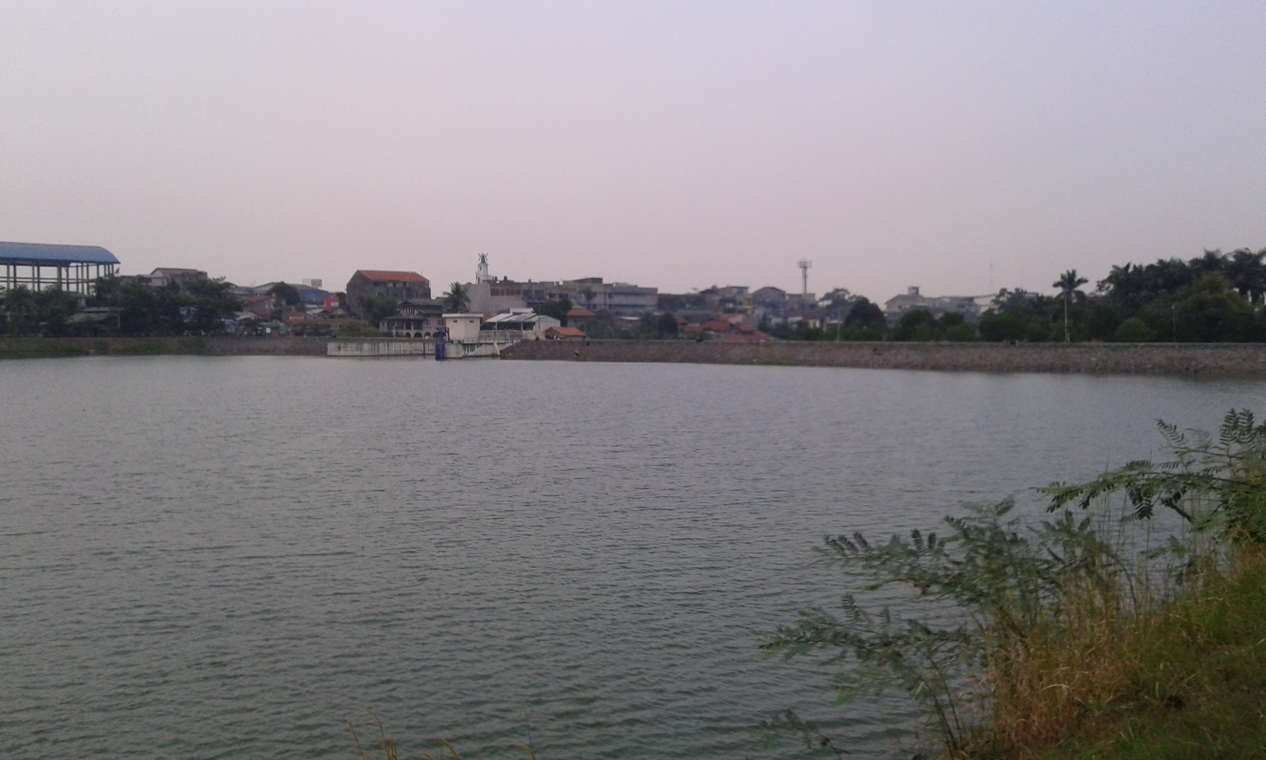 Tanggul Situ Gintung di Ciputat, Tangerang Selatan di tahun 2014